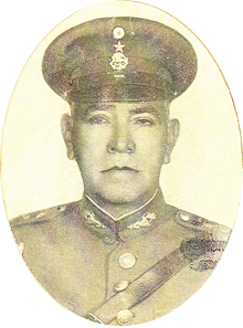 General Juvencio Nochebuena Palacios